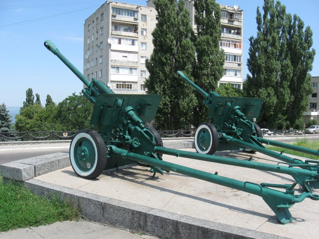 Світловодськ, Пам'ятник гарматам